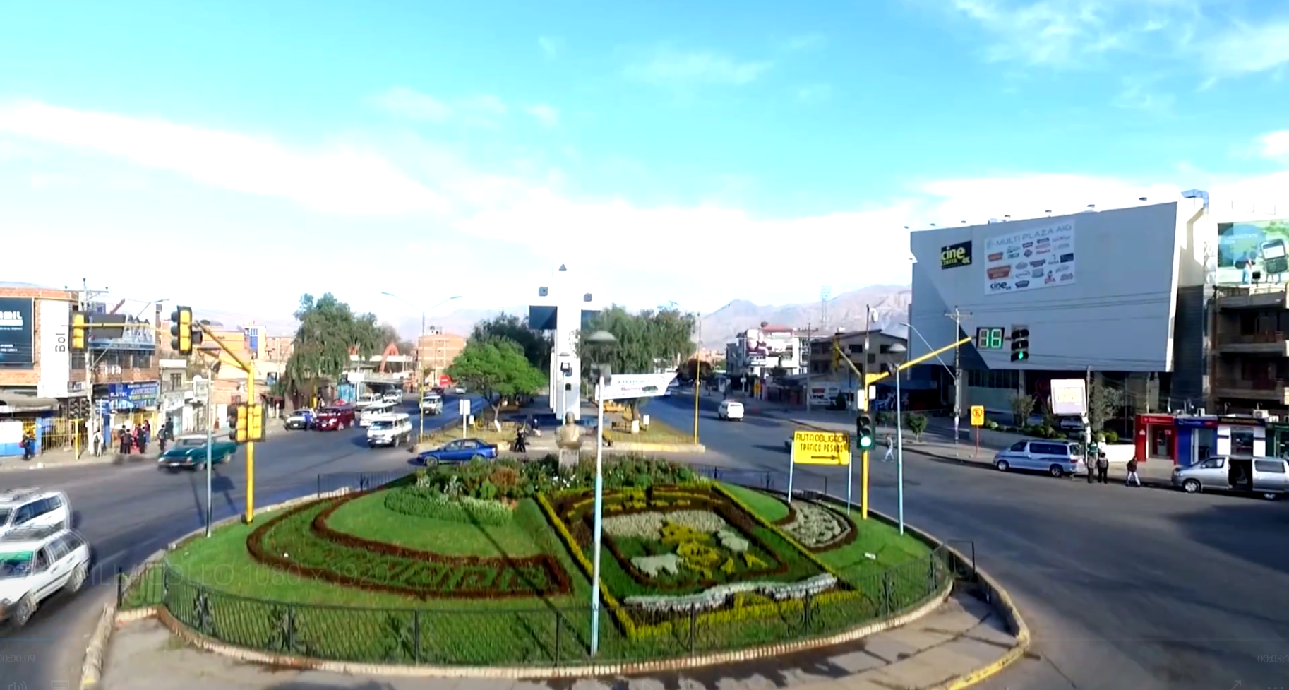 Avenida blanco galindo - Quillacollo.